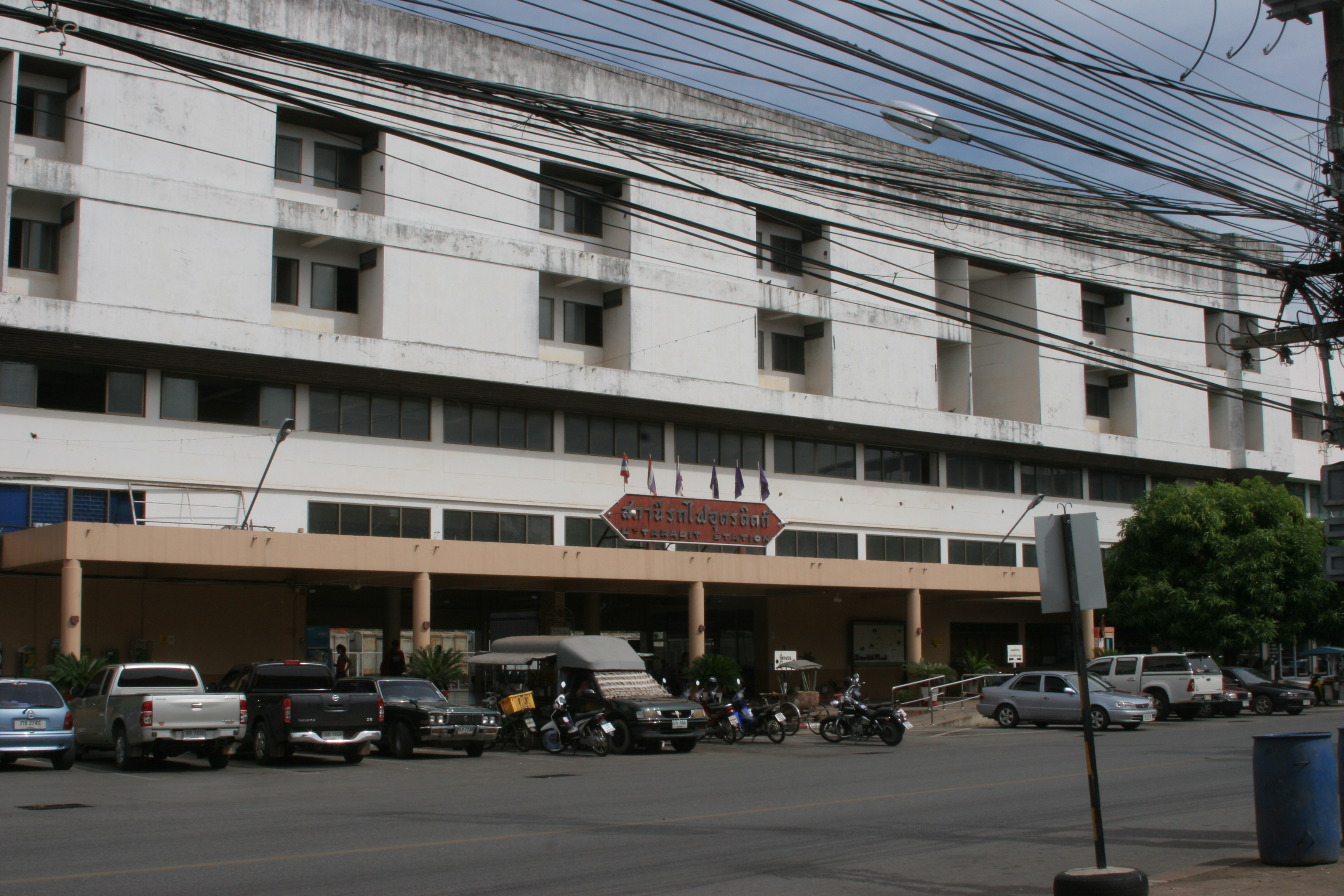 ウッタラディット駅